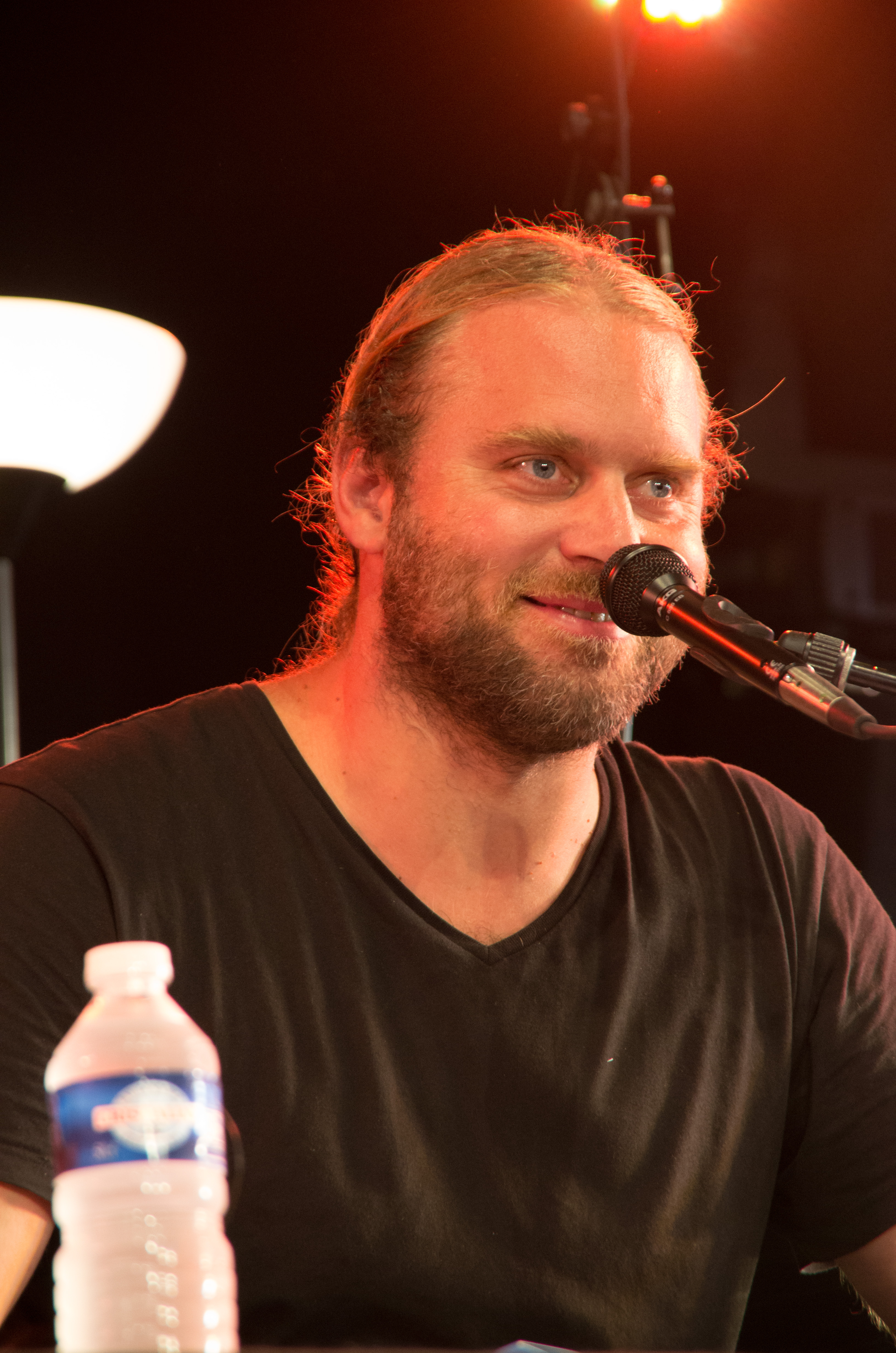 Das Zelt-Musik-Festival 2016 in Freiburg im Breisgau 24.07.2016 Andreas Hofmeir